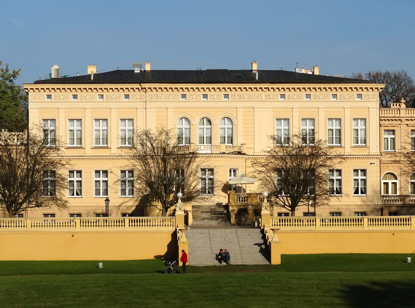 Ostromecko k. Bydgoszczy, pałac, tzw. Nowy, zbud. 1835-1848, 1891